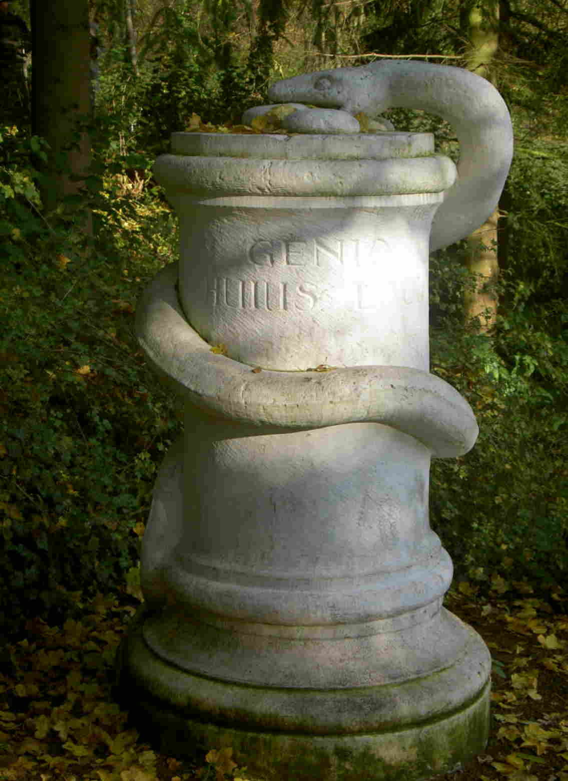 Schlangenstein im Goethepark in Weimar